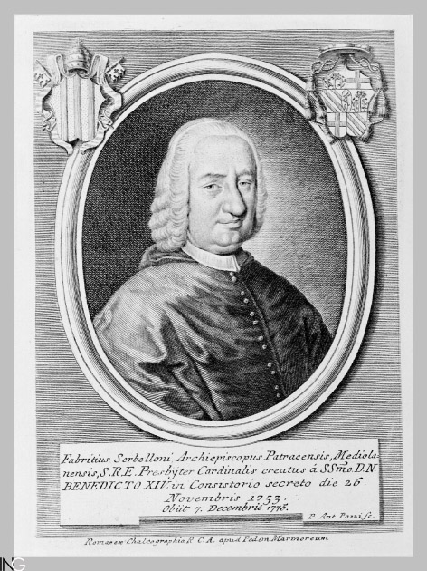 Kardinal Fabrizio Serbelloni (1695-1775), Apostolischer Nuntius in Wien